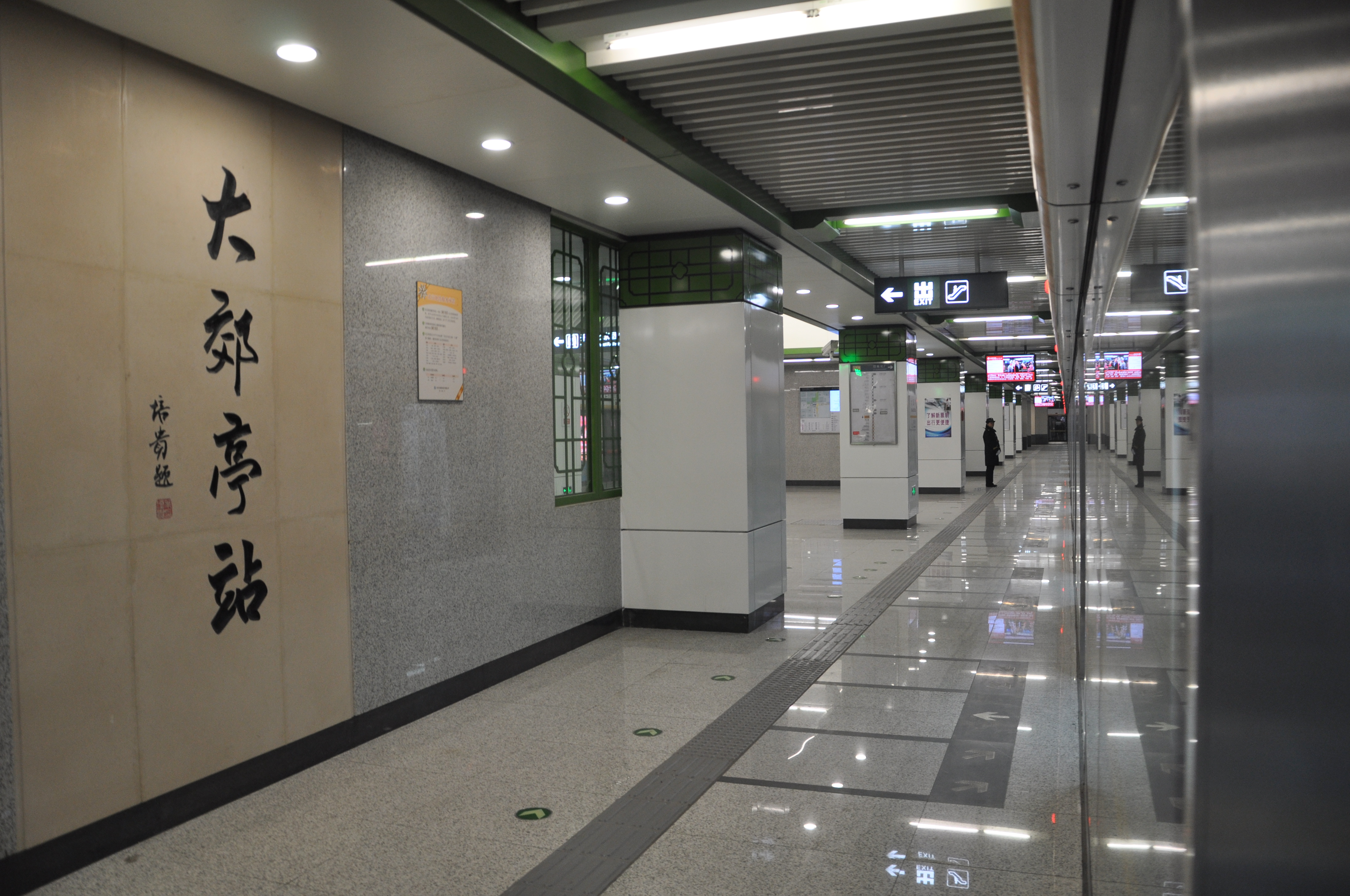 北京地铁7号线大郊亭站站台。